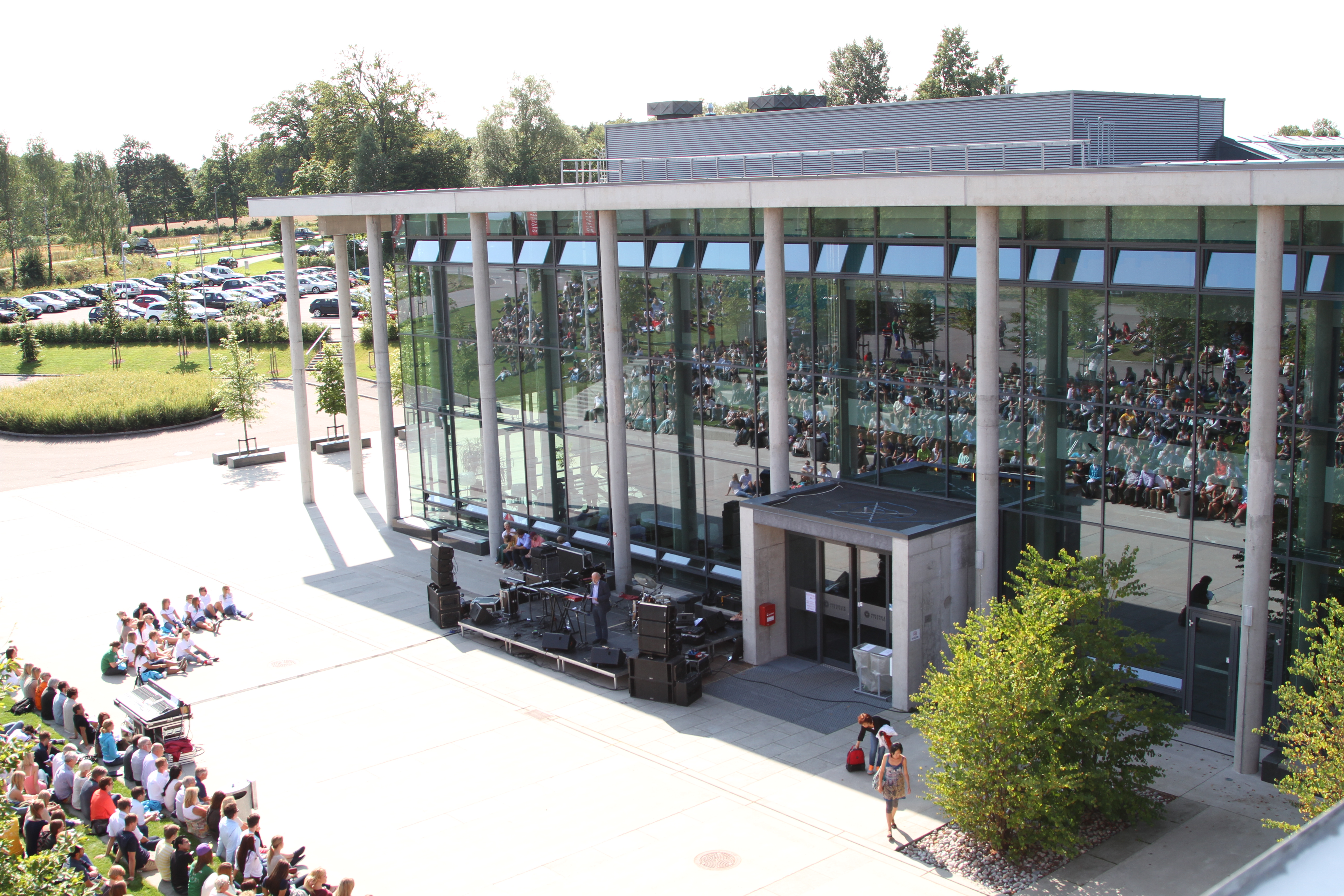 Fra studiestart 2013 ved Høgskolen i Vestfold, Bakkenteigen